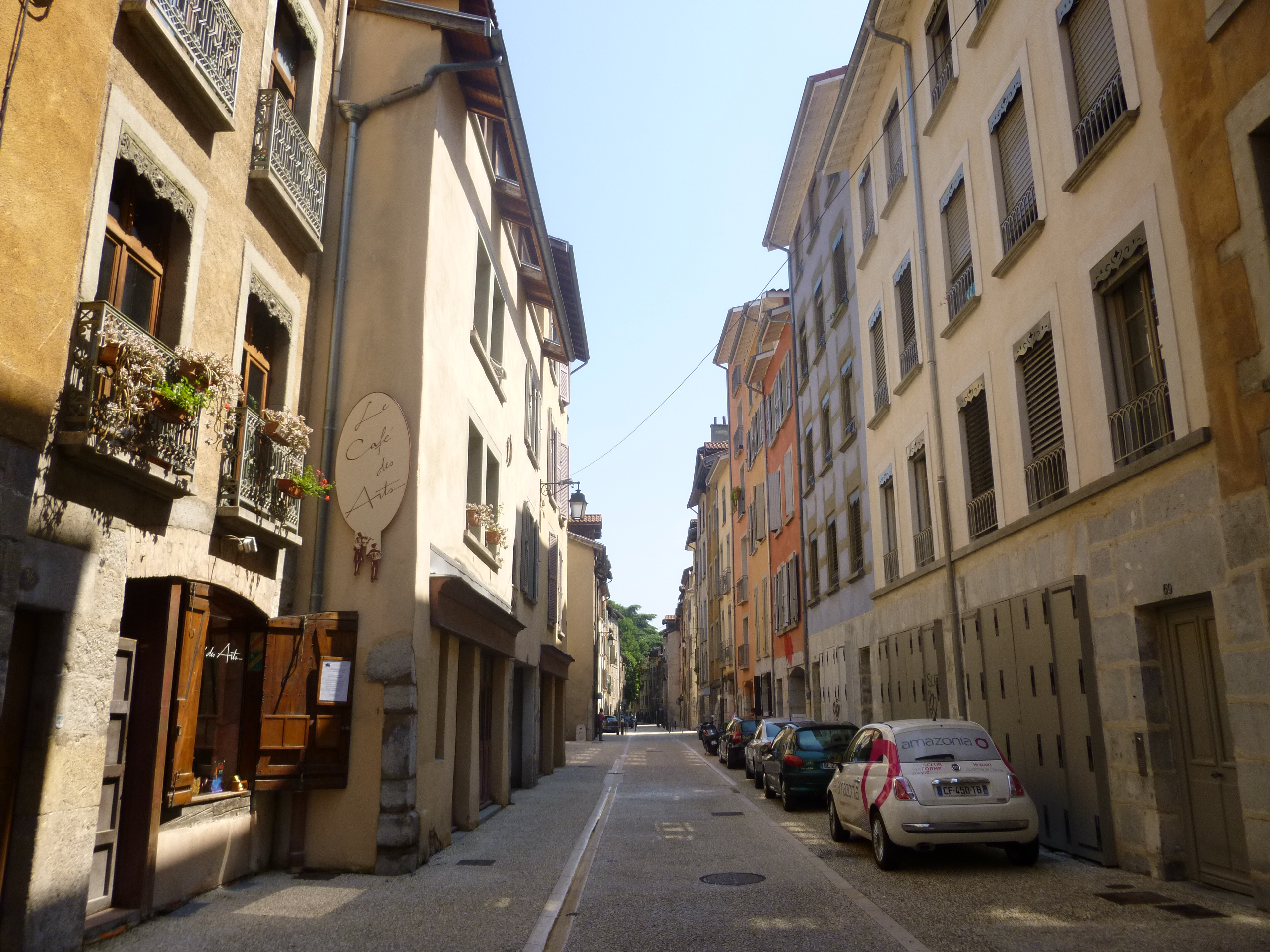 Rue Saint-Laurent, Grenoble.